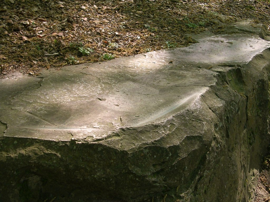 Polissoir néolithique sur la rive droite du Laizon inscrit MH à Bons-Tassilly (Calvados)